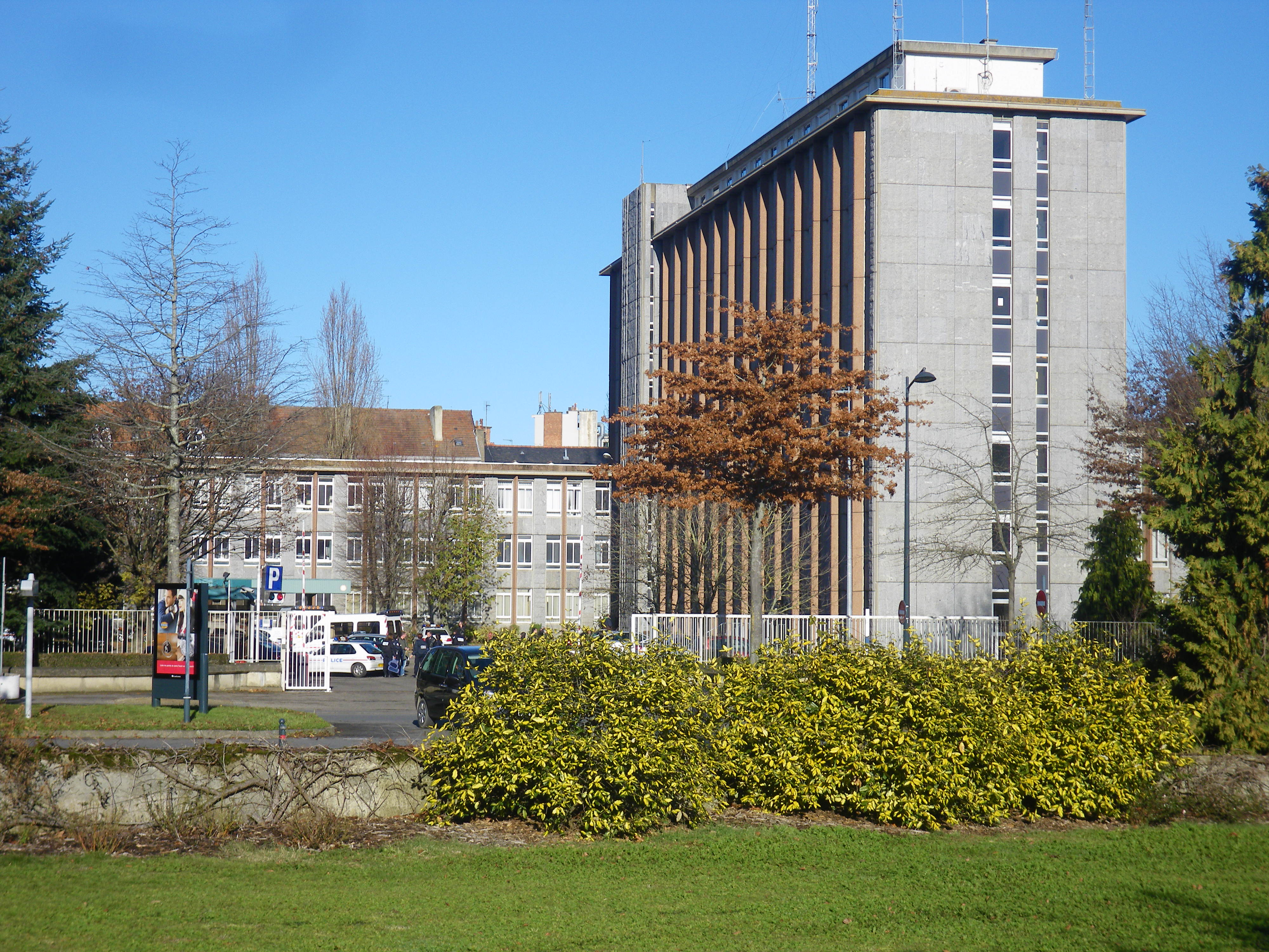 l'hotel de police boulevard de la tour d'auvergne a rennes